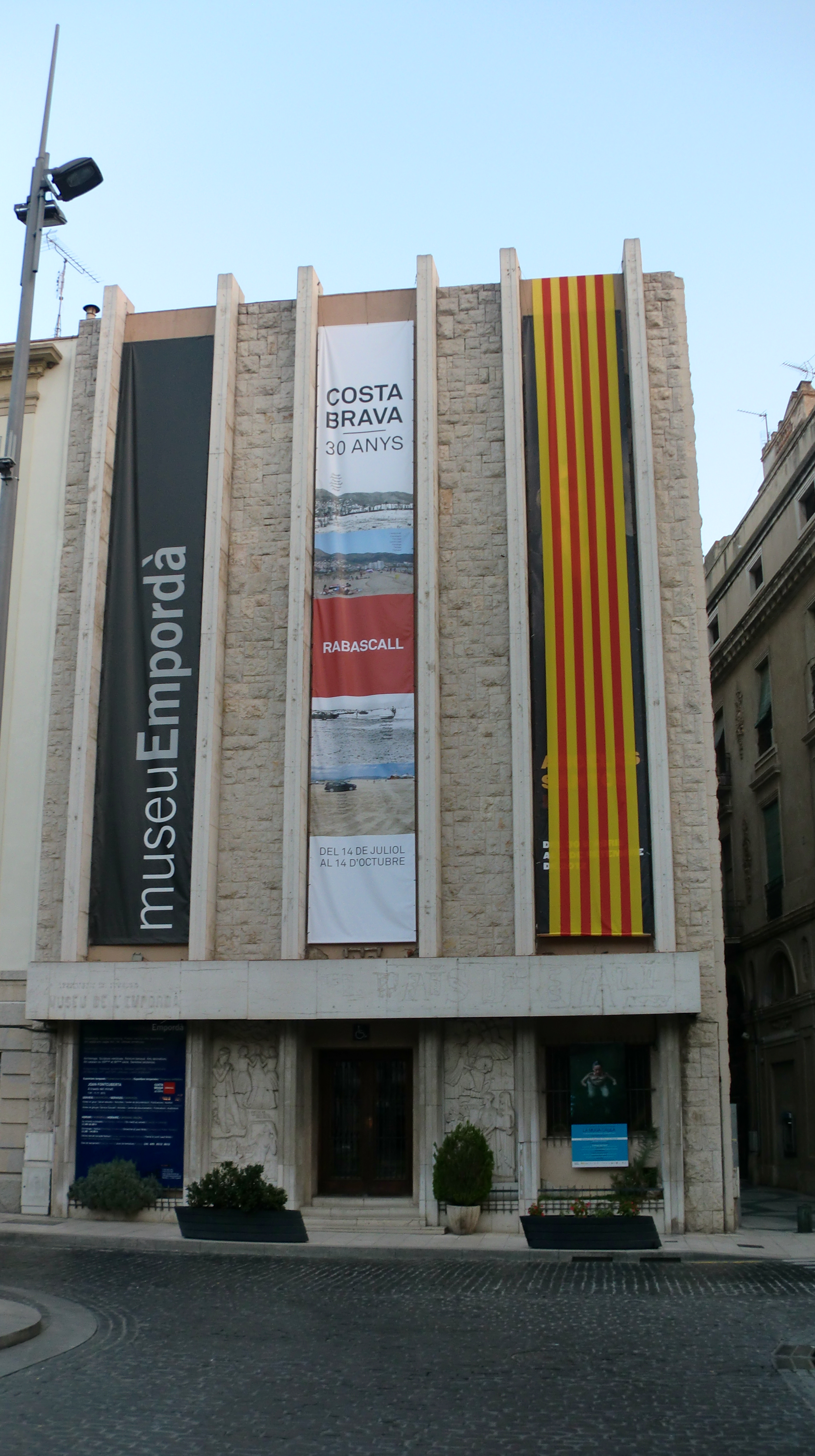 Museu de l'Empordà (Figueres)